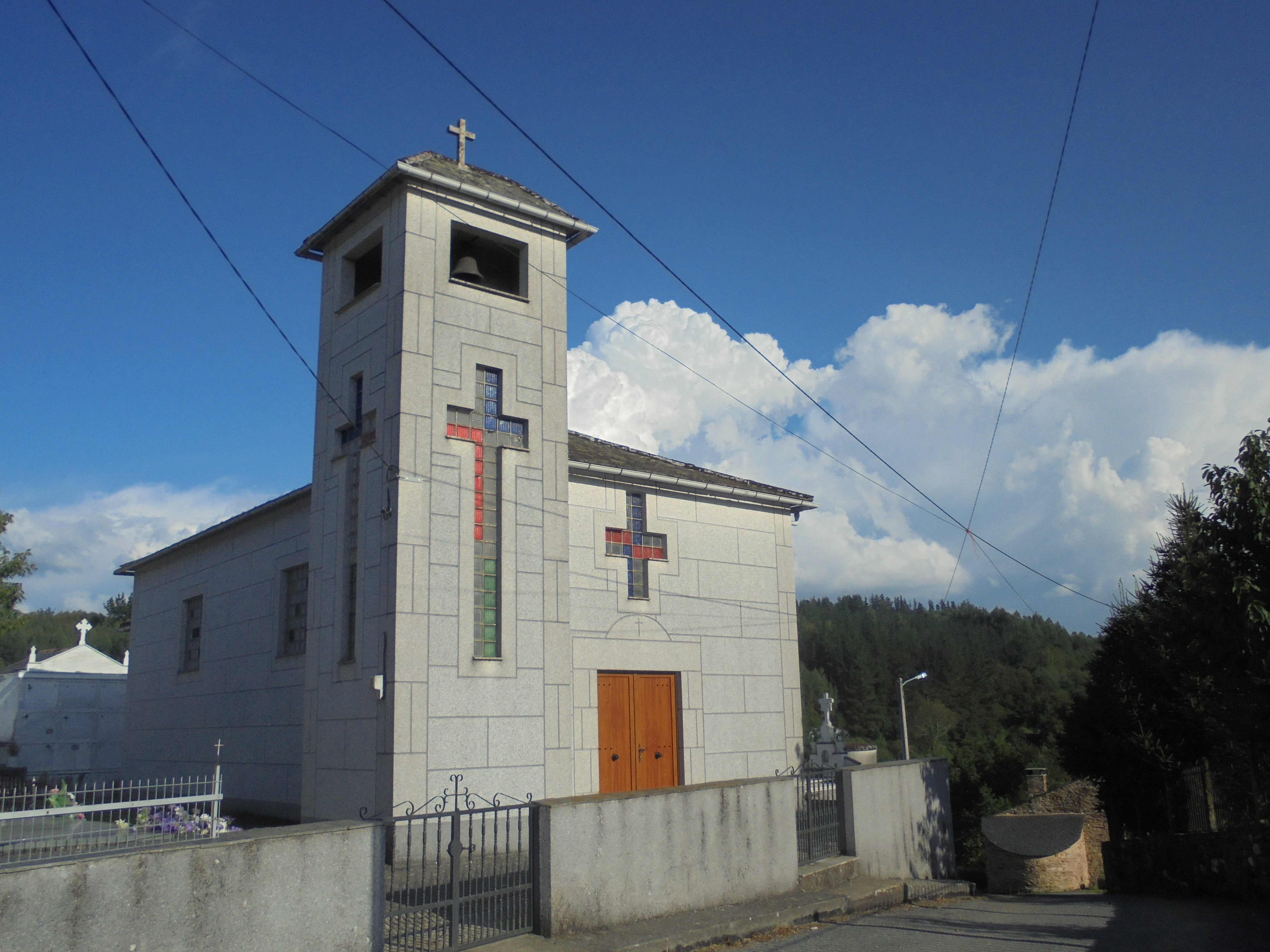 Igrexa parroquial de Vilartelín